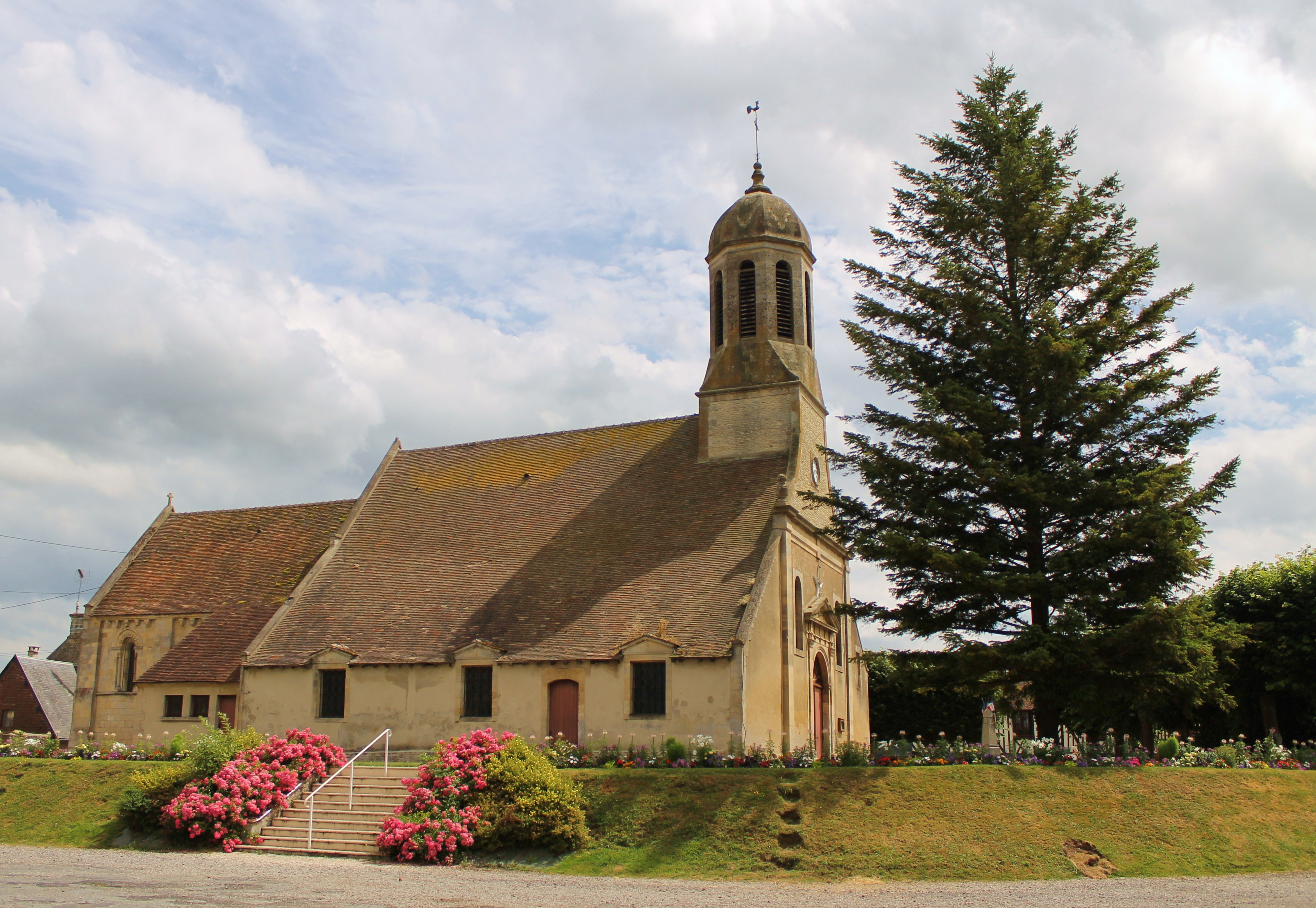 Église Saint-Martin de Méry-Corbon (Calvados)